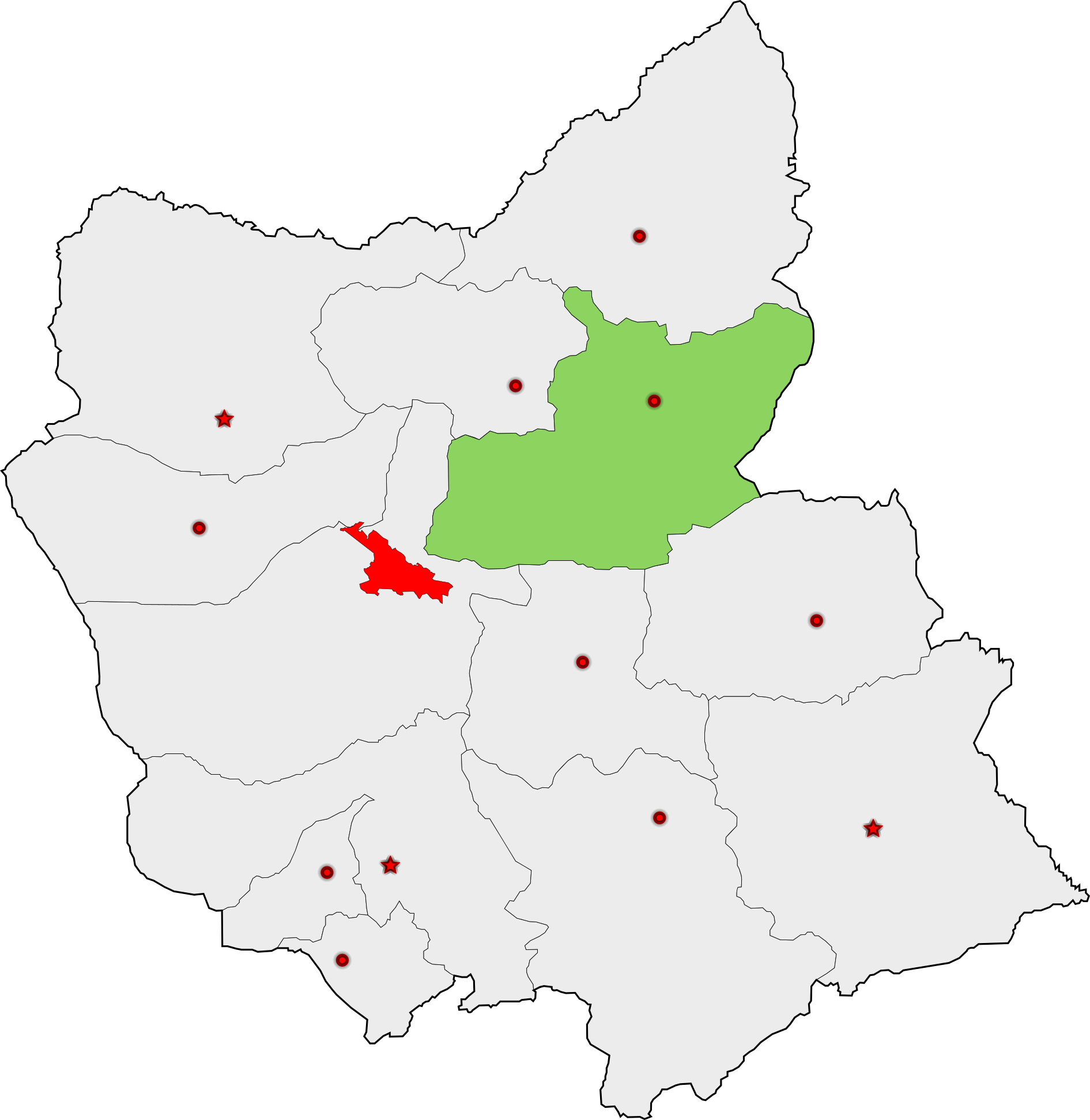 حوزهٔ انتخاباتی اهر برای انتخابات مجلس شورای اسلامی